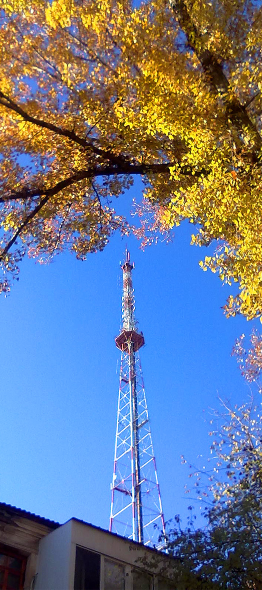 Телебашня в Луганске.